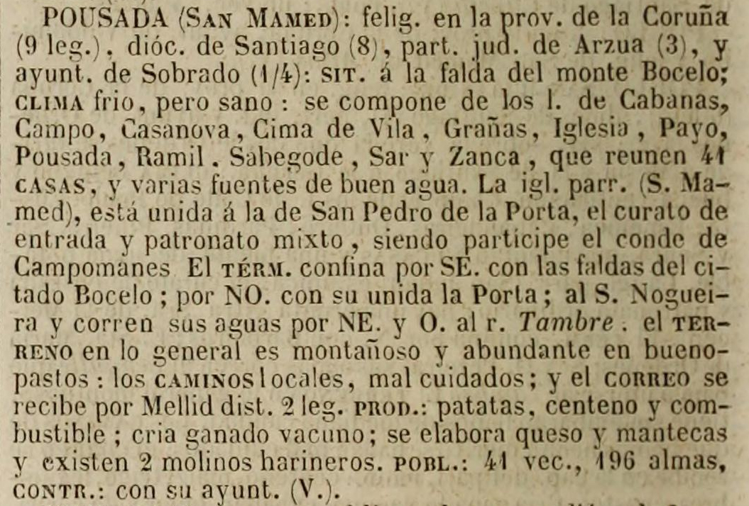 Pousada no Diccionario geográfico-estadístico-histórico de España y sus posesiones de Ultramar.